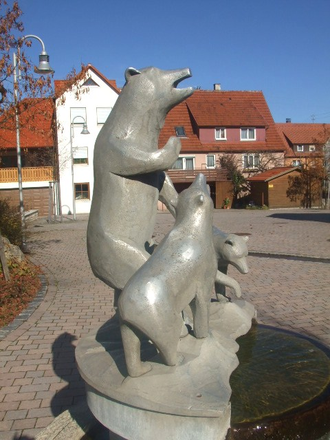 Erpfingen, Gemeinde Sonnenbühl, Landkreis Reutlingen Bärenbrunnen in Erpfingen